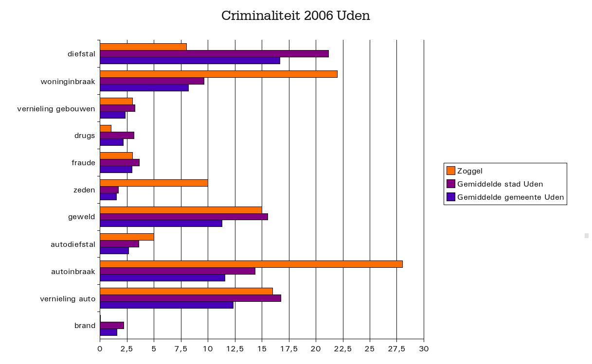 Criminaliteitcijfers in Uden Zoggel (2006), Noord-Brabant, The Netherlands